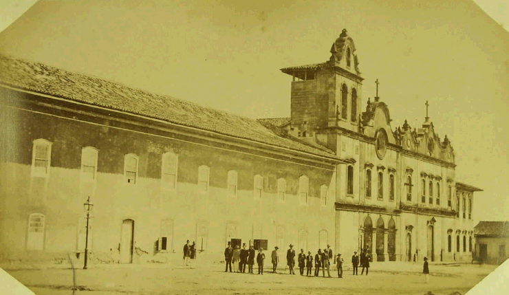 Academia de Direito e Convento de São Francisco, São Paulo, Brasil